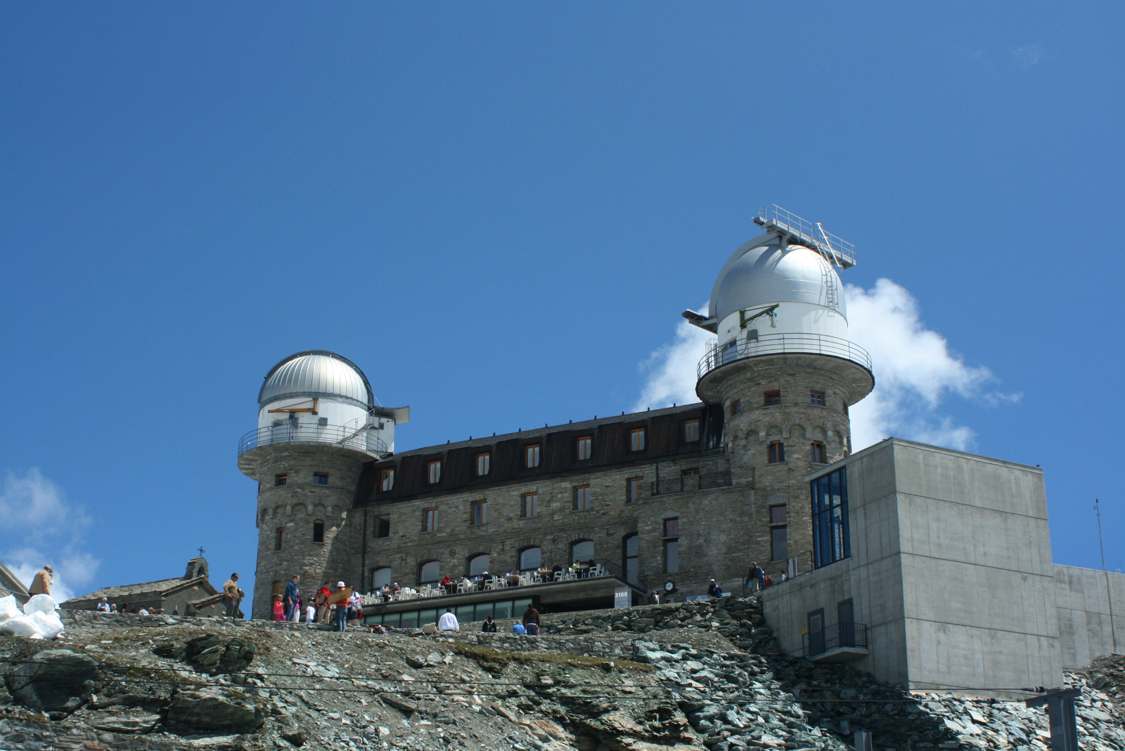 Zdjęcie przedstawia górną stację kolejki "Gornergratbahn", a właściwie hotel znajdujący się przy niej.